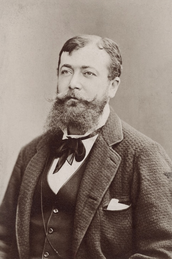 Hector Callias, journaliste et écrivain, portrait.